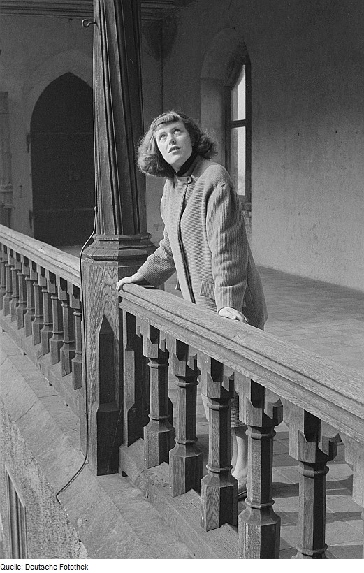 Original image description from the Deutsche FotothekRenate Rössing posiert an einer Balustrade der Albrechtsburg